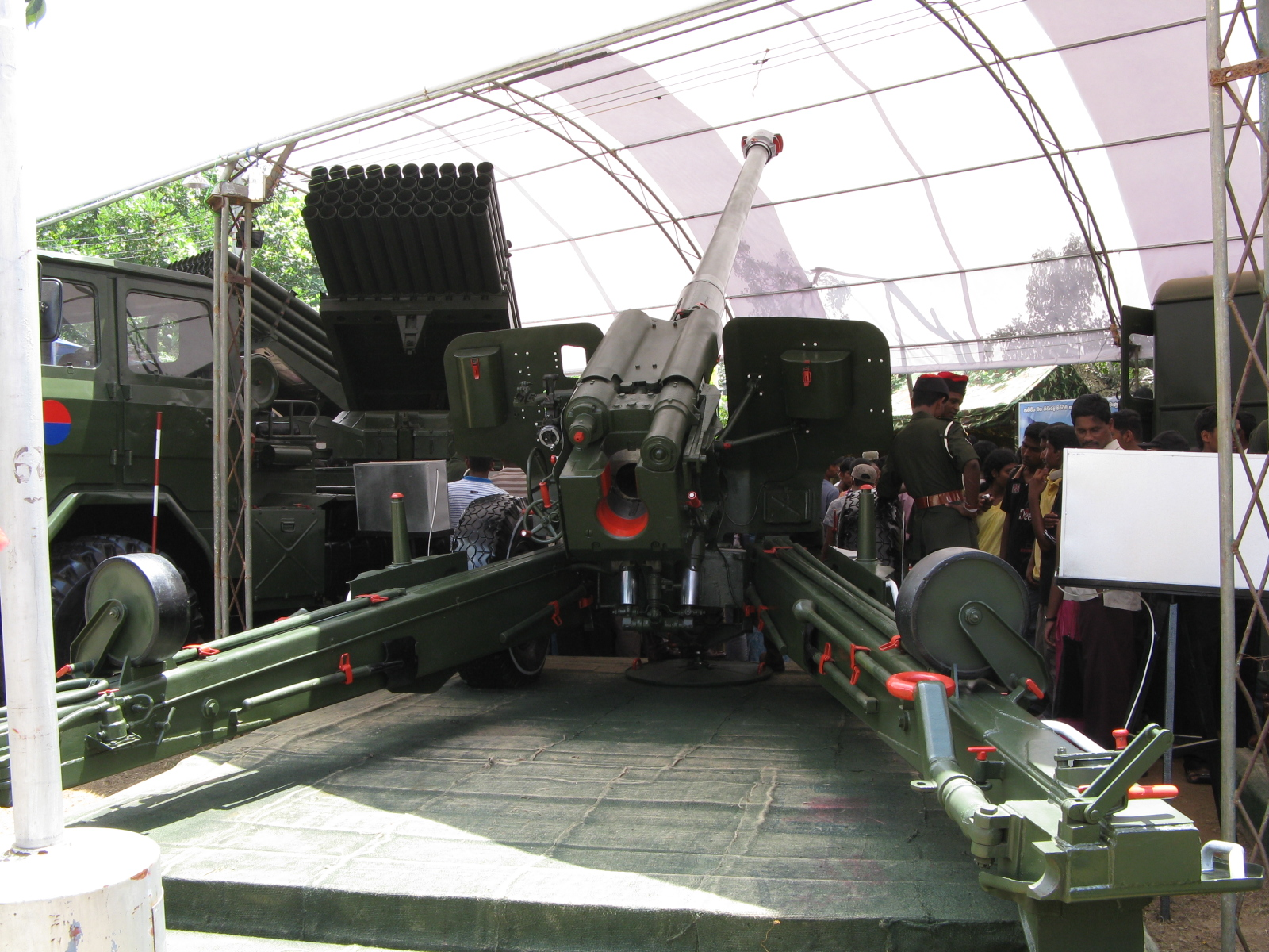 Type 66 152mm Artillery - Sri Lanka Army